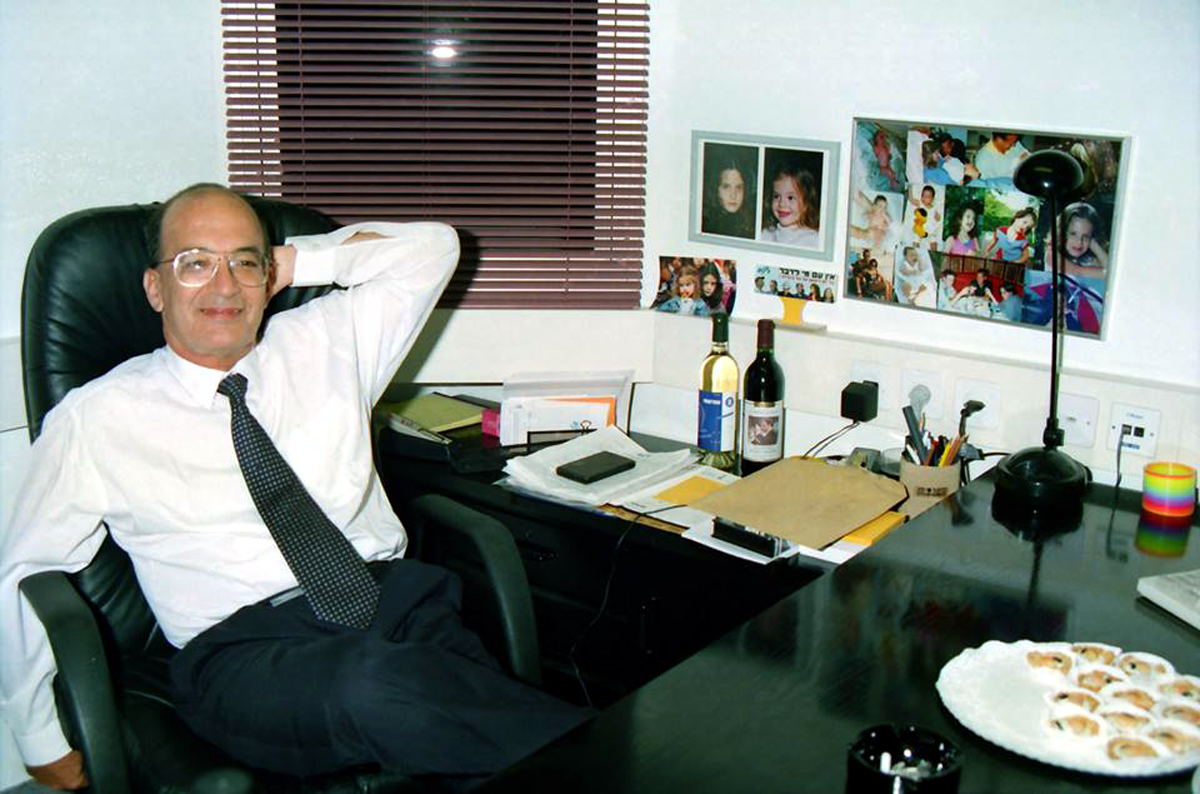 יוסי שריד ברגע אתנחתא